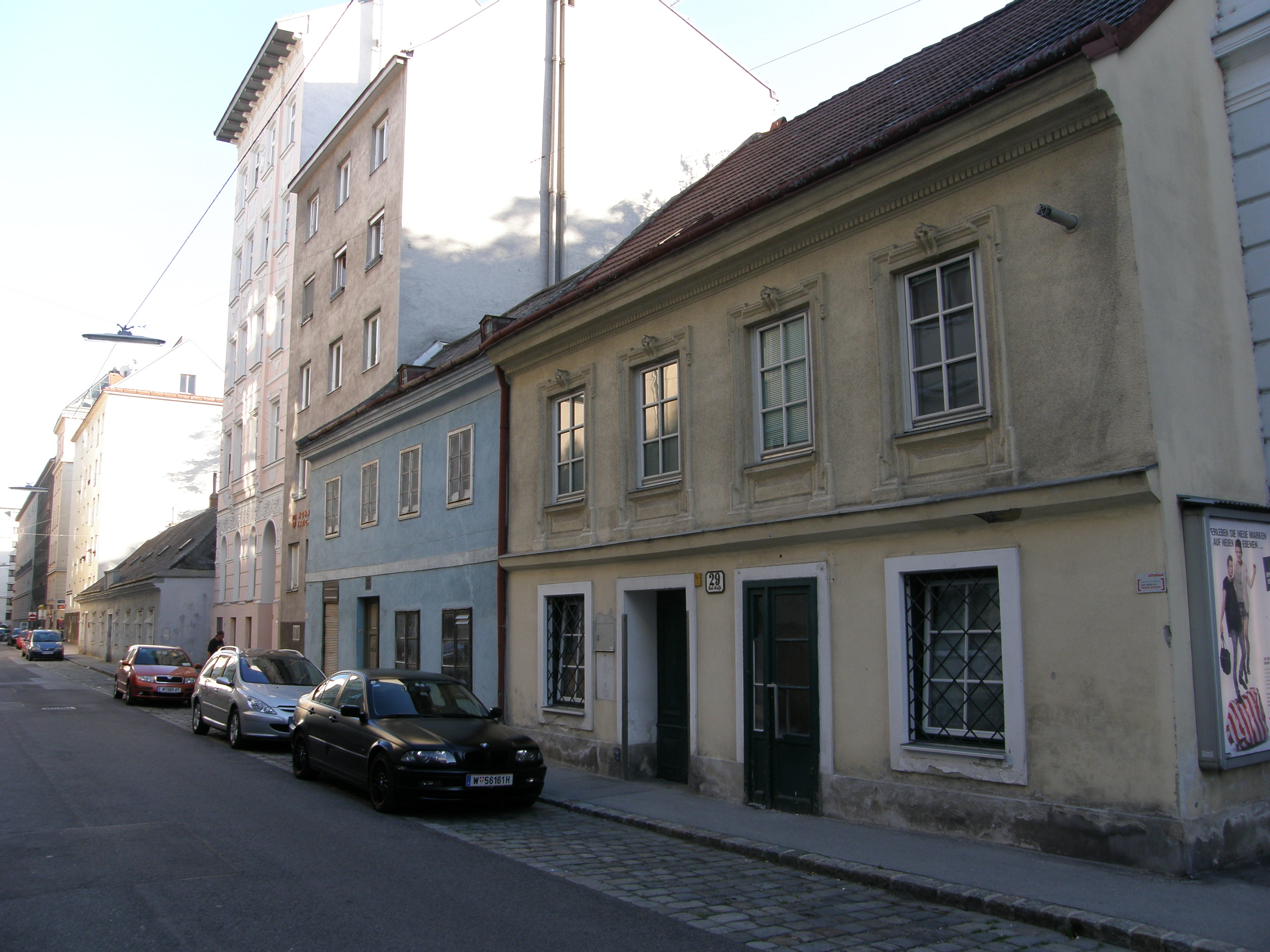 Wien, Badgasse (Lichtenthal)